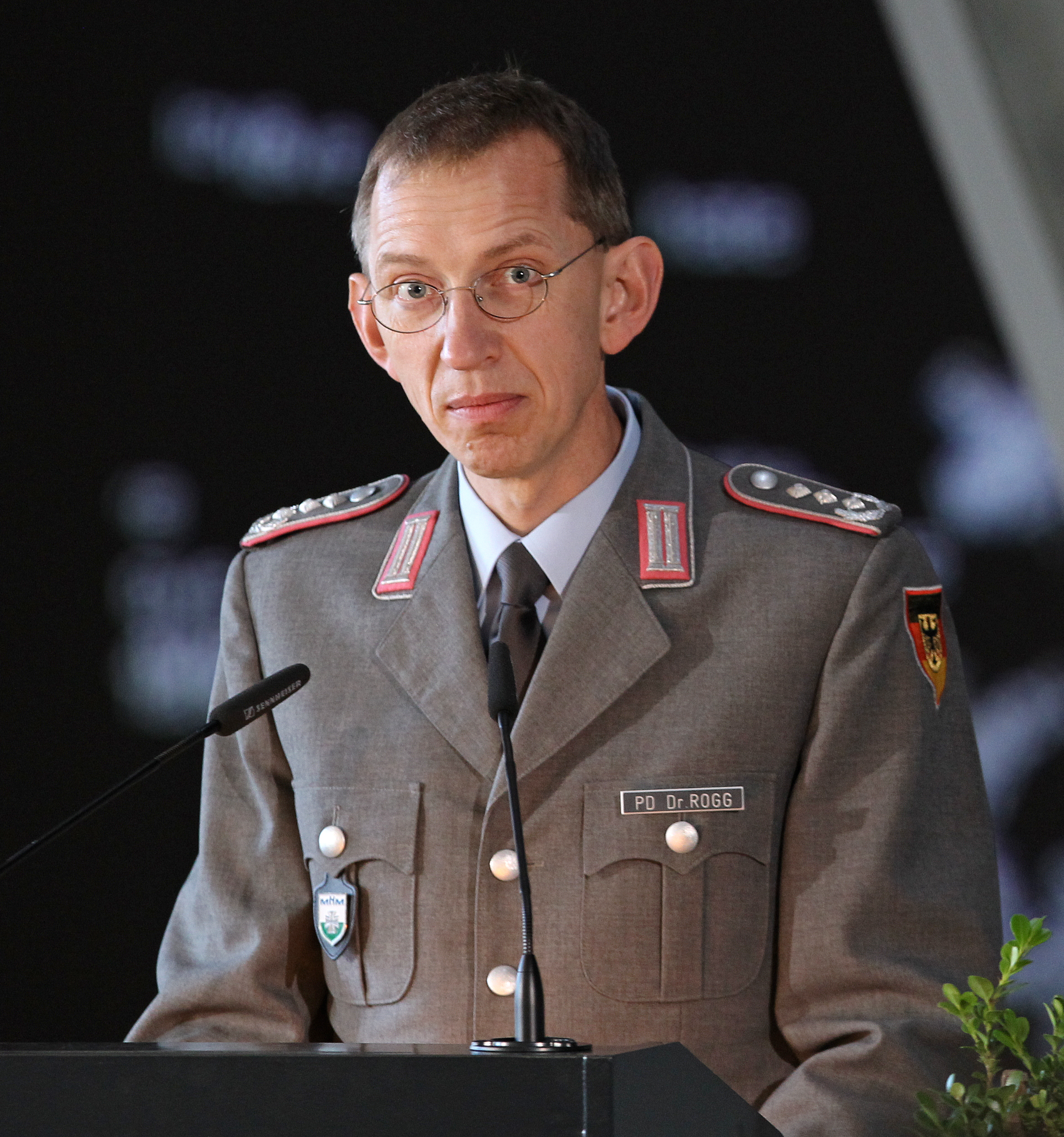 Nach einer siebenjährigen Umbauzeit wird das Militärhistorische Museum der Bundeswehr in Dresden am 14. Oktober 2011 neu eröffnet. Das Museum ist mit über 10500 in der Dauerausstellung gezeigten Exponaten auf 19.000 Quadratmetern Ausstellungsfläche eines der größten und modernsten militärhistorischen Museen Europas. Im Bild: Im Rahmen des Festaktes richtet der Direktor des Museums, Oberst PD Dr. Matthias Rogg Worte an die Gäste.